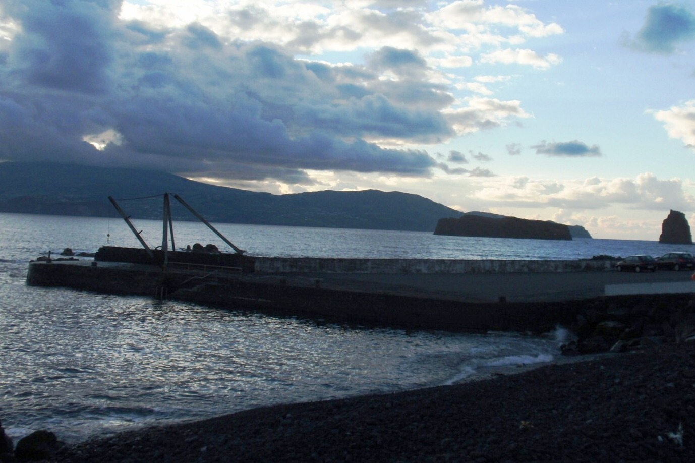 Porto da Areia Larga, freguesia e concelho de Madalena do Pico, ilha do Pico, Açores. Em plano intermédio, à direita, os ilhéus da Madalena.